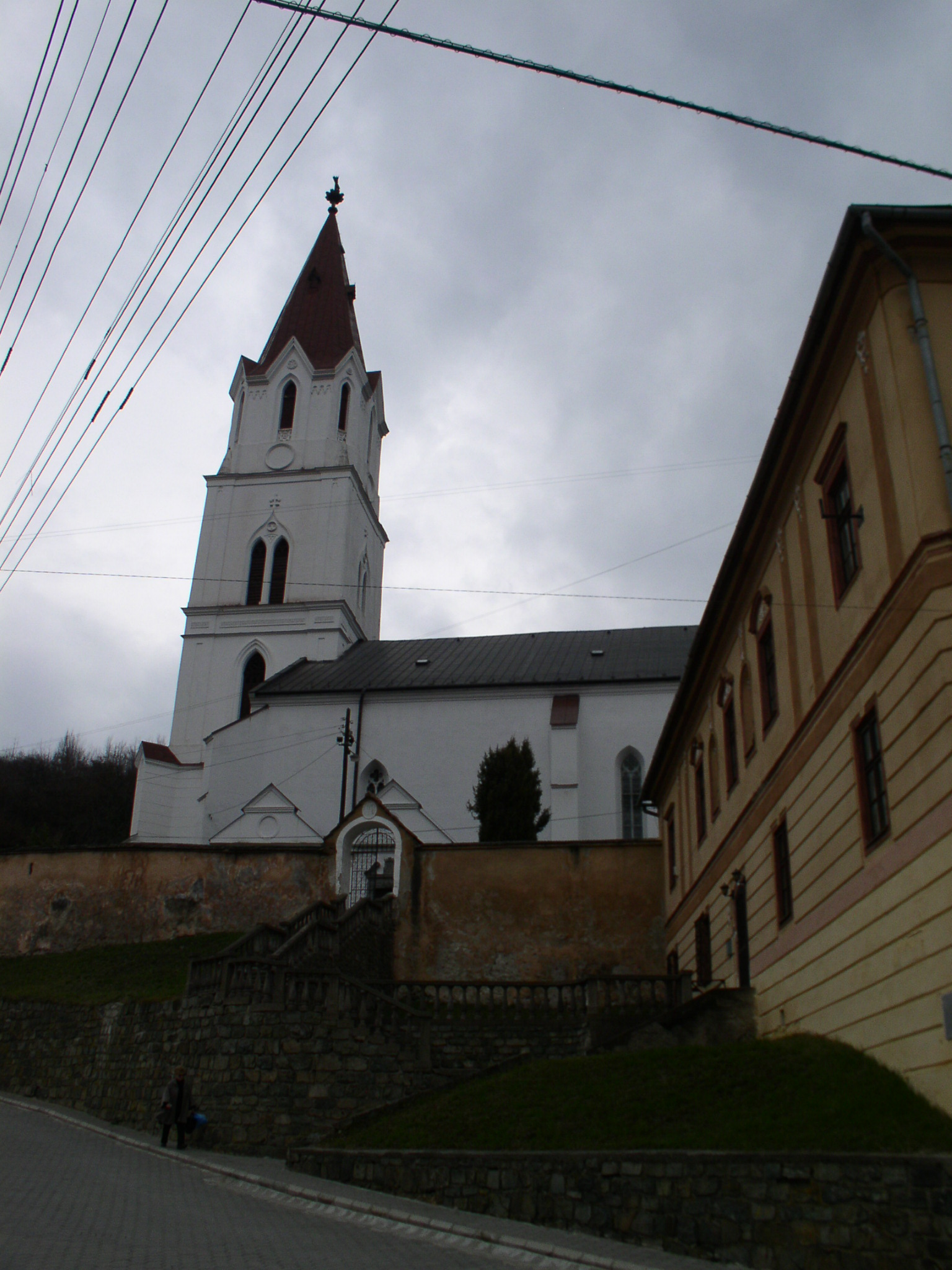 Kostol Nanebovzatia Panny Márie v Gelnici, na pravo sa nachádza budova rímskokatolíckeho farského úradu.